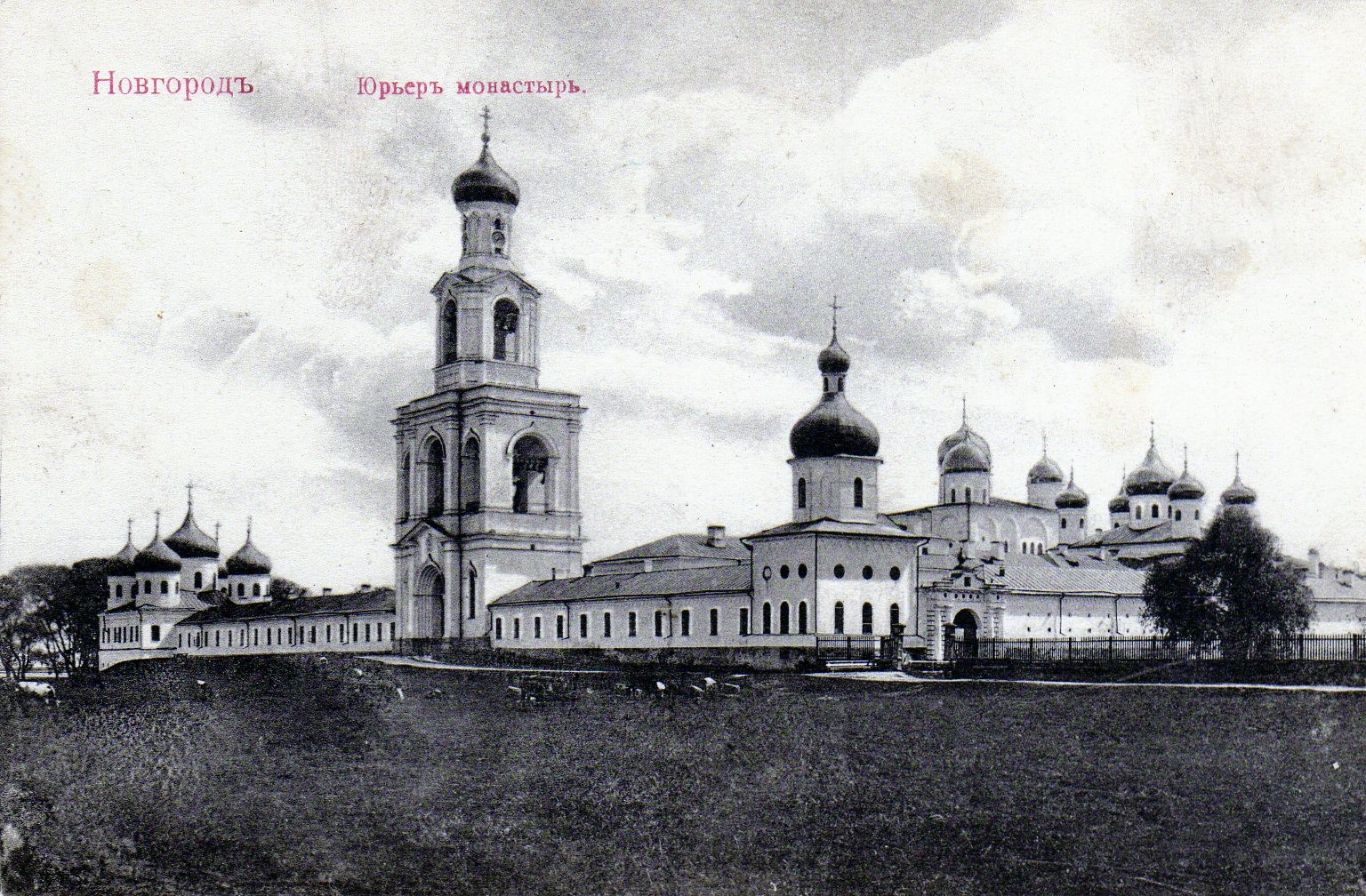 Юрьев монастырь (Великий Новгород) на почтовой открытке (до 1917 года)